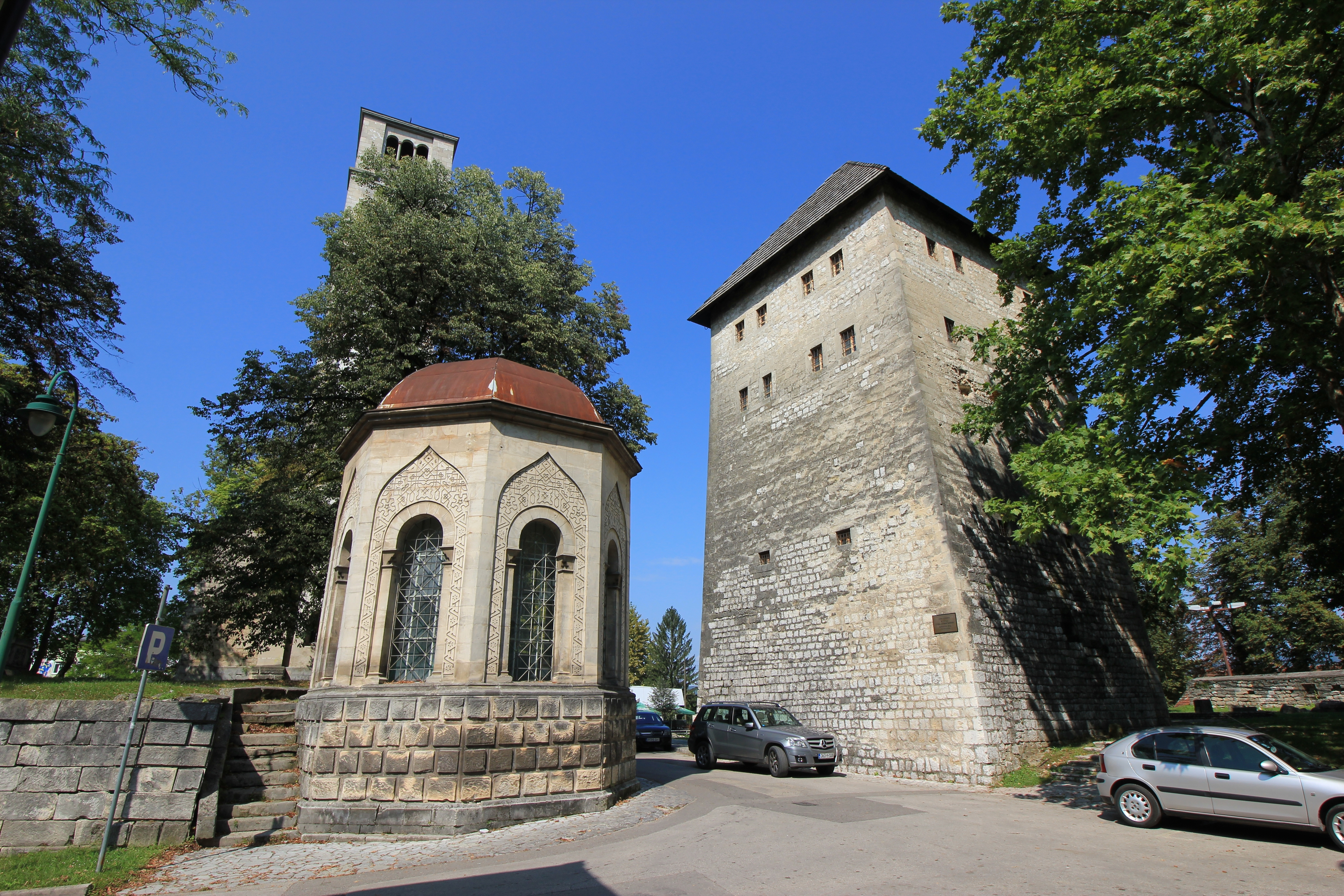 Kapitänsturm in Bihać, Bosnien.